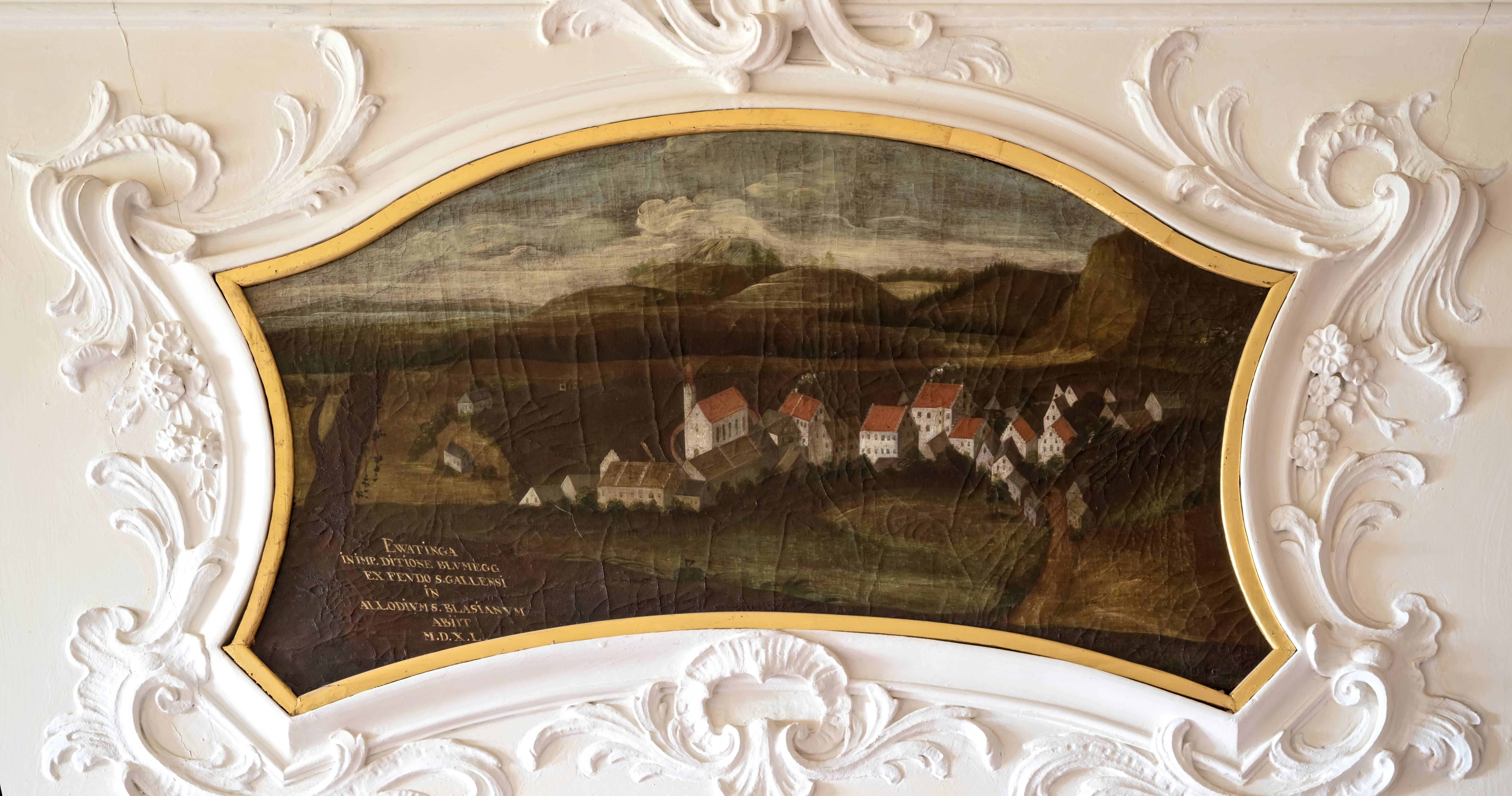 Bilder aus dem Schloß Bürgeln Hier Bilder von den Supraporten im ersten Stock des Schloßes. Es sind Bilder der Probsteien des Kloster St. Blasien und einige Füllbilder in einem später erstellten Flügel EWATINGA INIMP. DITIOSE BLVMEGG EX FEVDO S: GALLENSI IN ALLODIVUM S: BLASIANVM ABIIT M.D.X.L.